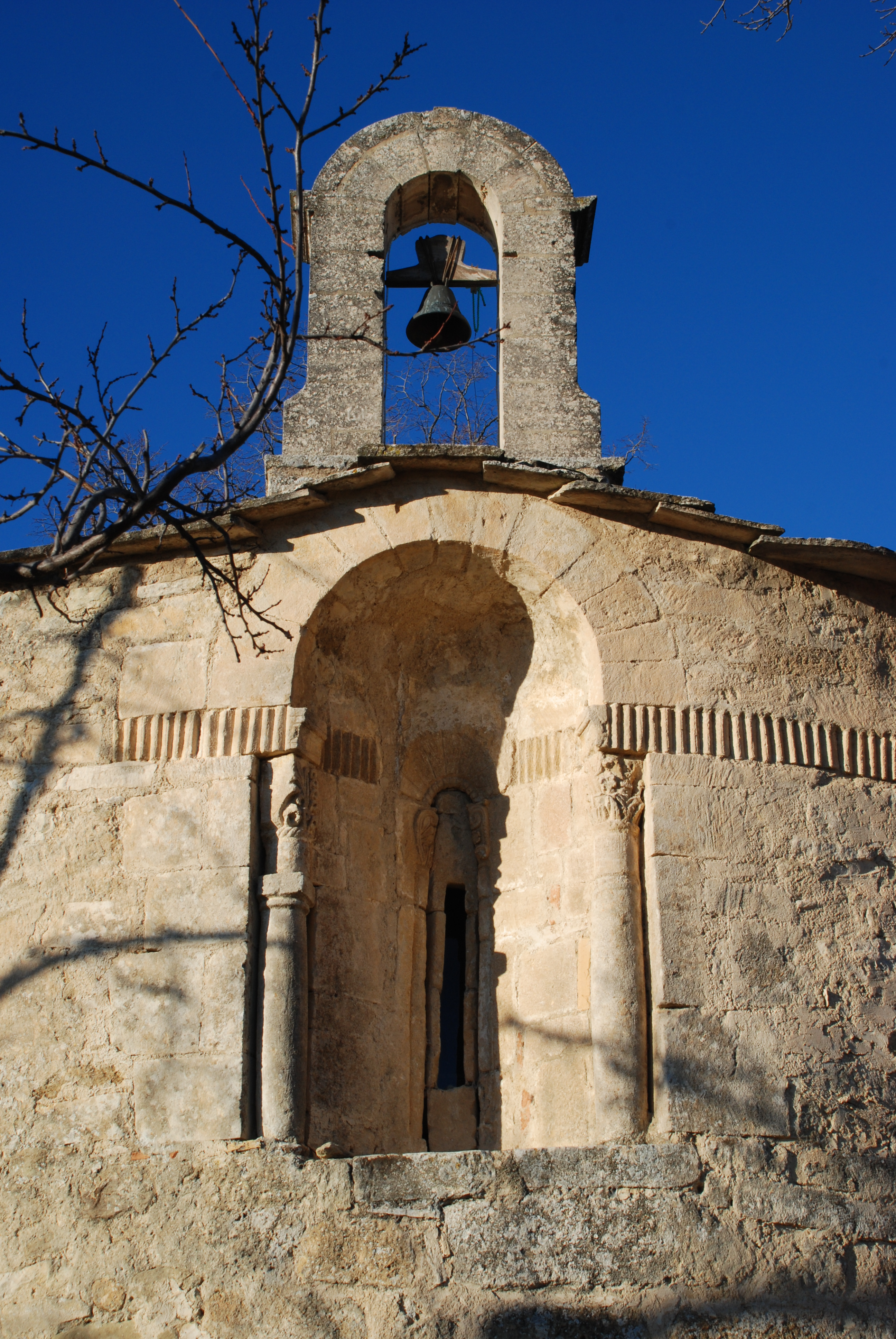 France - Provence - Chapelle Saint-Pierre de Pierrerue